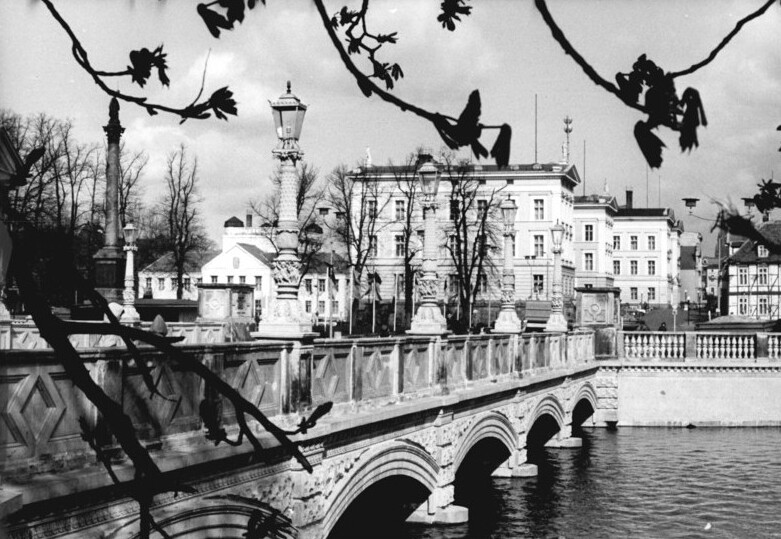 Schwerin, Schloßbrücke ADN-ZB Pätzold-16.5.1985 Schwerin: Schloßbrücke-Ein architektonisches Kleinod Schwerins ist die Schloßbrücke. 1843 entwarf Georg Adolf Demmler die erste steinerne Brücke an gleicher Stelle. Bei dem notwendig gewordenen Neubau hielten sich die Architekten des Ingenieurbüros für Straßenwesen an wesentliche Details des historischen Vorbilds. So wurden die Schmuckelemente an den Postamenten detailgetreu nachgestaltet. Die Stadt Schwerin begeht im Juni 1985 den 825. Jahrestag ihrer Gründung. (siehe auch 14 und 15N)